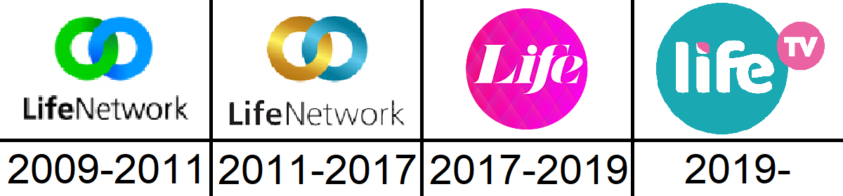 A LifeTV logói 2009-től mostanáig